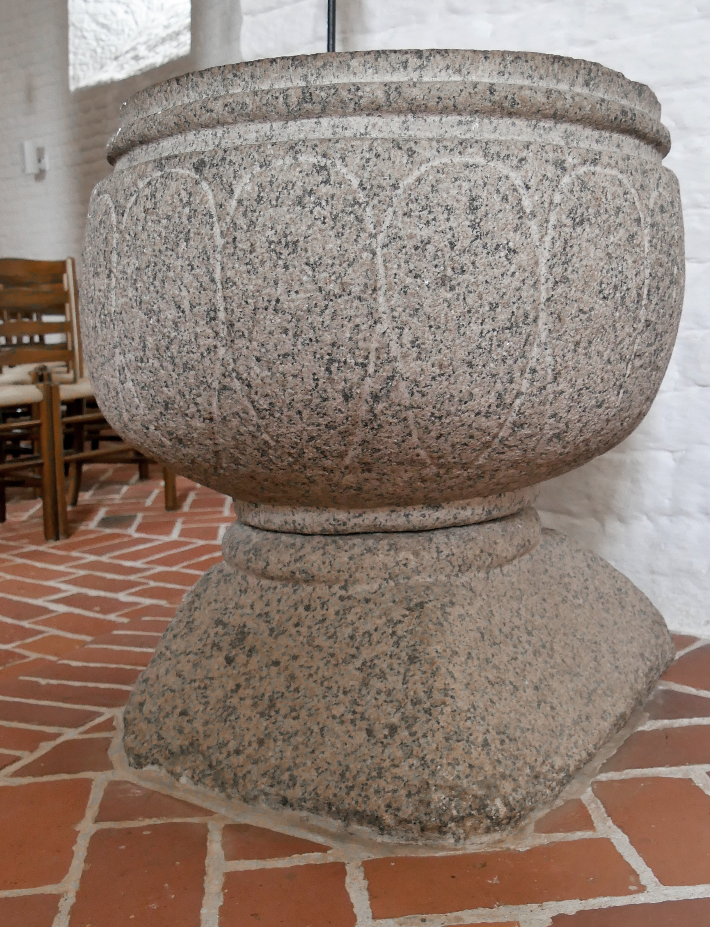 Kirche in Thorsager - Romanischer Taufstein